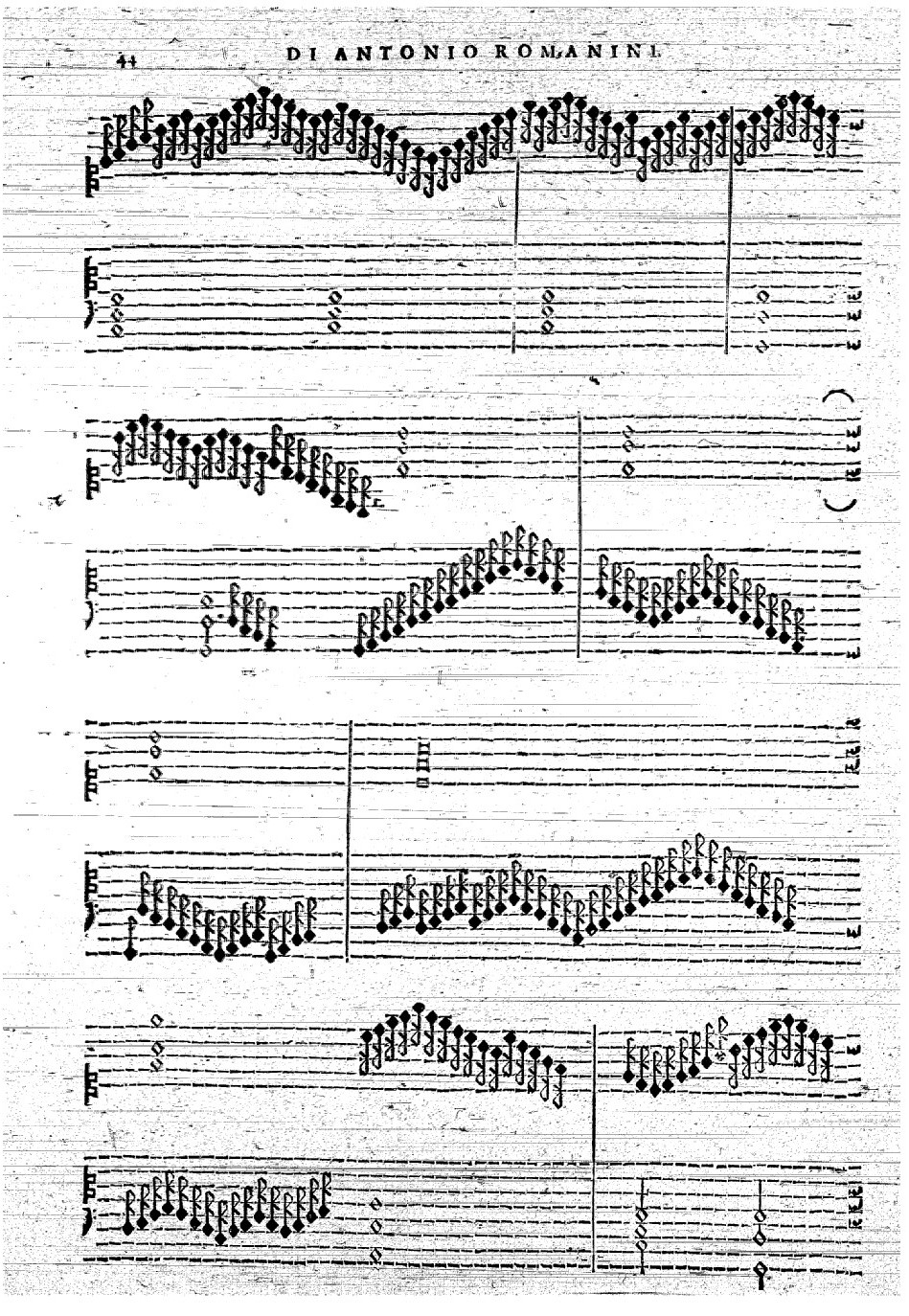 Antonio Romanini, Toccata, extraite du « Il transilvano », publié par Girolamo Diruta à Venise.